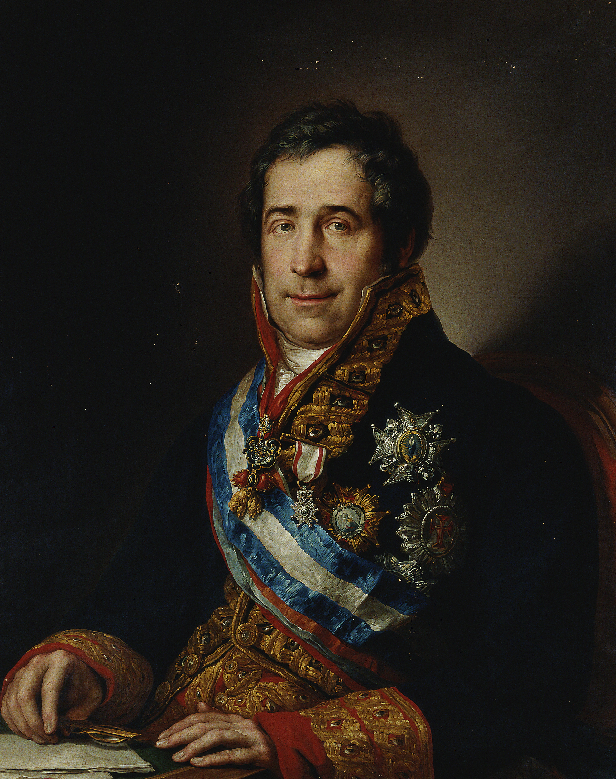 Retrato del político español Francisco Tadeo Calomarde (1773-1842). Ocupó el ministerio de Gracia y Justicia (1823-1833) durante la restauración absolutista de Fernando VII, y promulgó un célebre Plan General de Estudios. Y también fue caballero de la Orden del Toisón de Oro (1829), de la Orden de Carlos III (1809) de la Legión de Honor y académico de Honor de la zaragozana Real Academia de Nobles y Bellas Artes de San Luis.